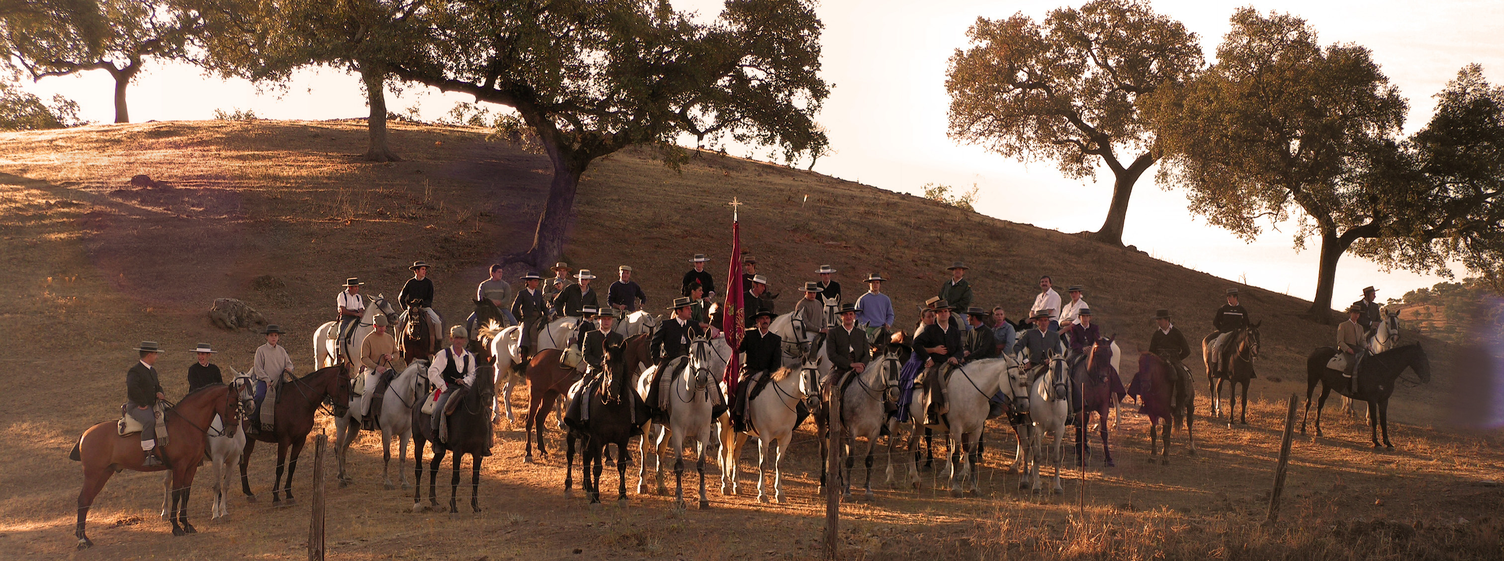 Caballistas rindiendo respeto a Ntra. Sra. La Virgen del Puerto, en Zufre, Huelva (Andalucía), España.